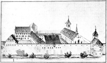 Kloster Sankt Agnesen in Schaffhausen von Osten. Sepia-Zeichnung von Hans Wilhelm Harder